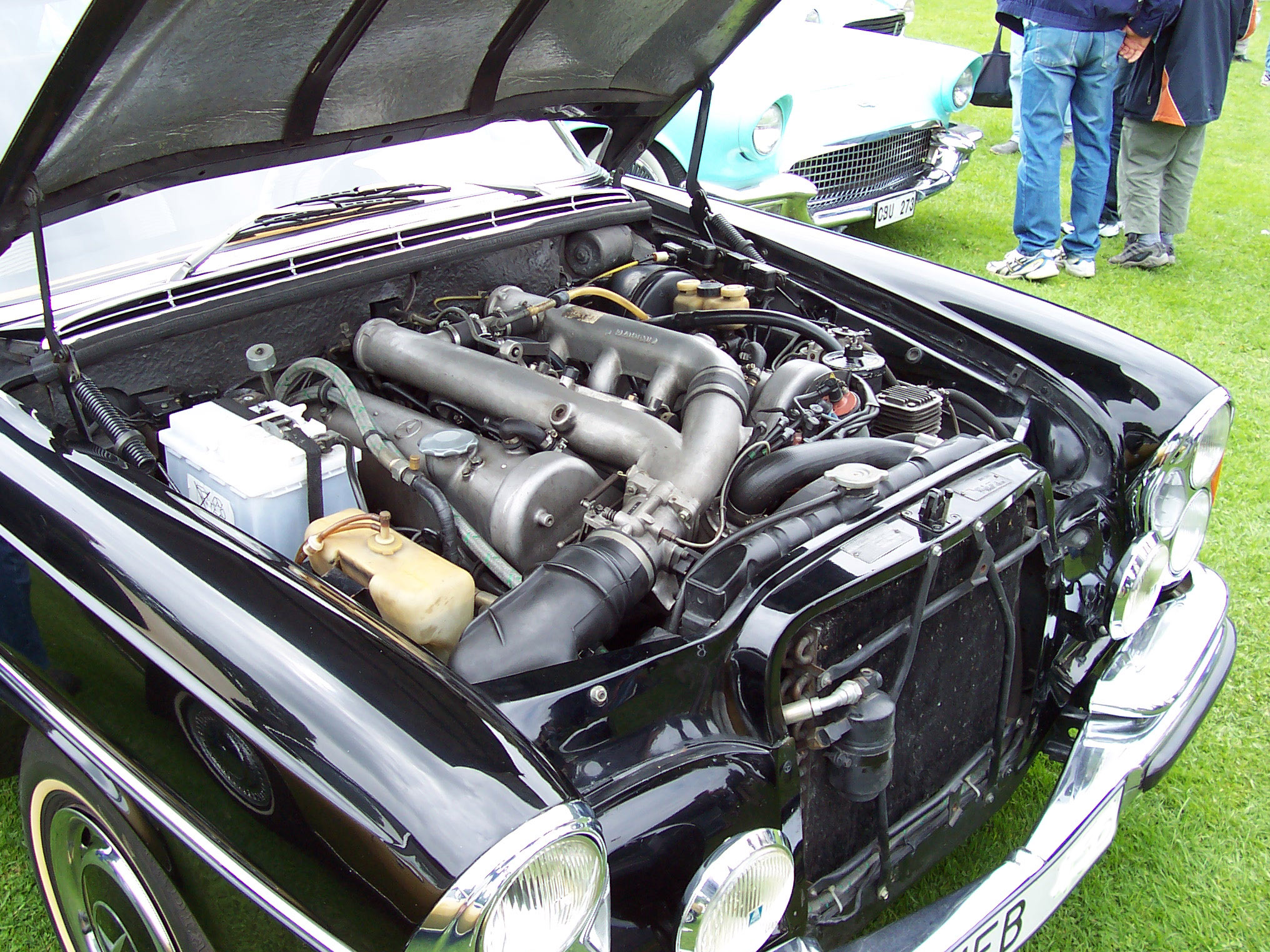 M100 engine in a Mercedes-Benz 300SEL 6.3 Sedan